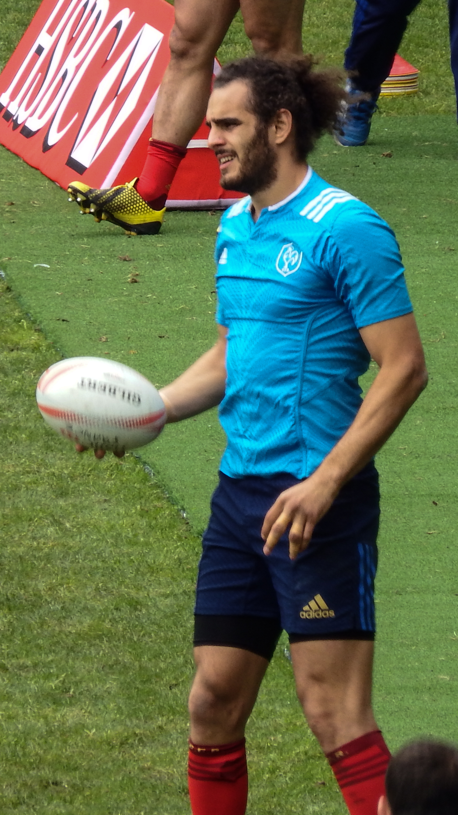 2016 Paris Sevens — 14 May 2016, stade Jean-Bouin. Match between: Argentina — France